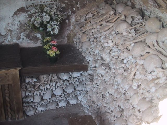 Beinhauskrypta Vintrange Lothringen - Lizenzstatus: GNU-FDL Bildquelle: selbst fotografiert